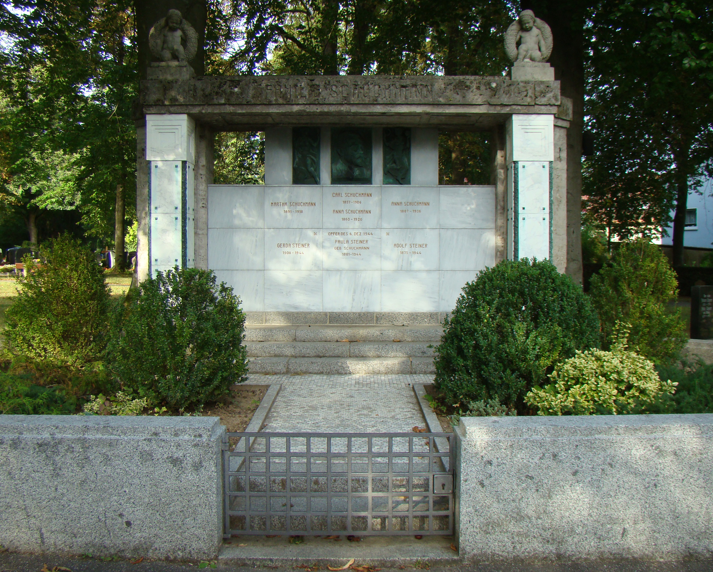 Familiengrabmal Schuchmann auf dem Friedhof in Heilbronn-Böckingen, vg. Denkmaltopographie Ba-Wü Bd. I.5 Heilbronn (2007), S. 365 Abb. 495: Heidelberger Straße 60, Ehrengrab